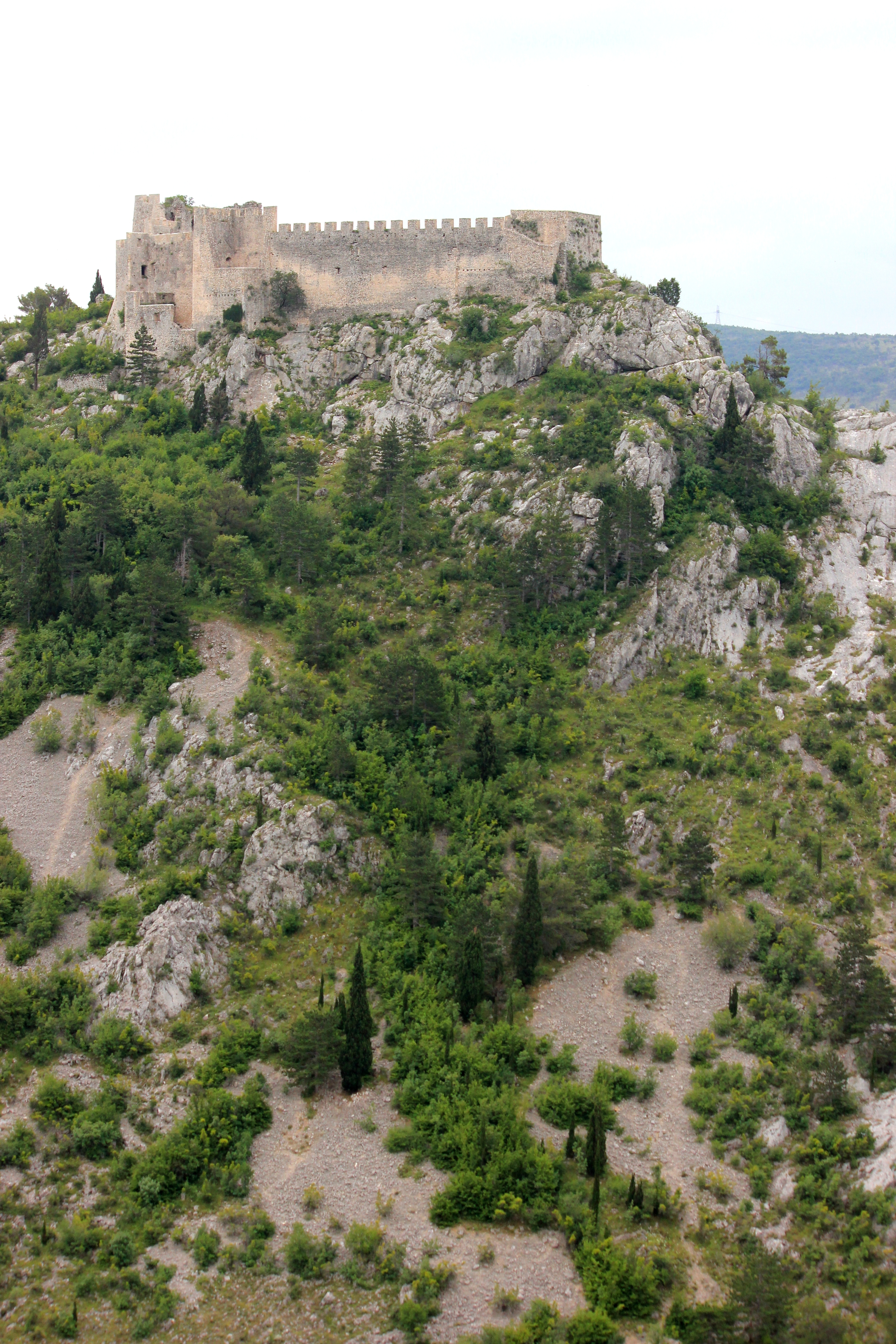 Die Burg oberhalb von Blagaj